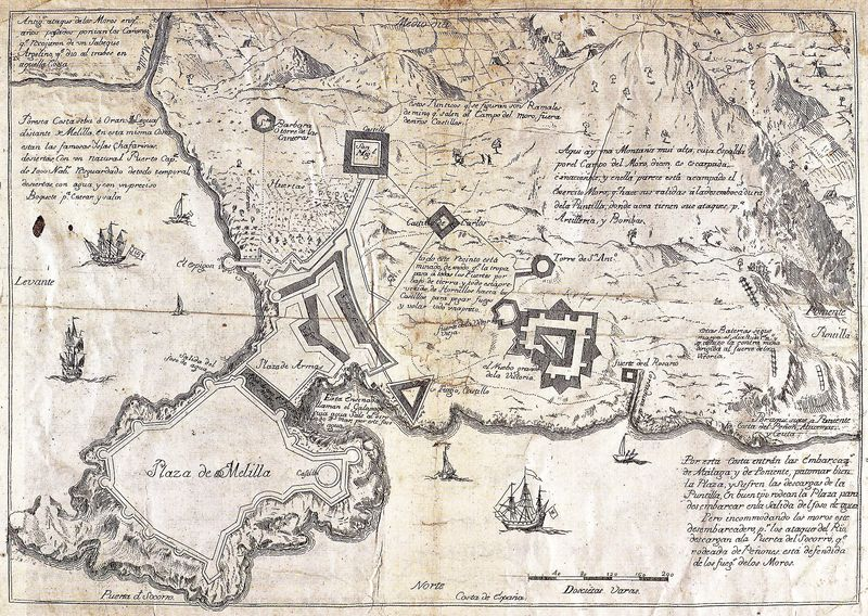 Plaza de Melilla, 1774-1775